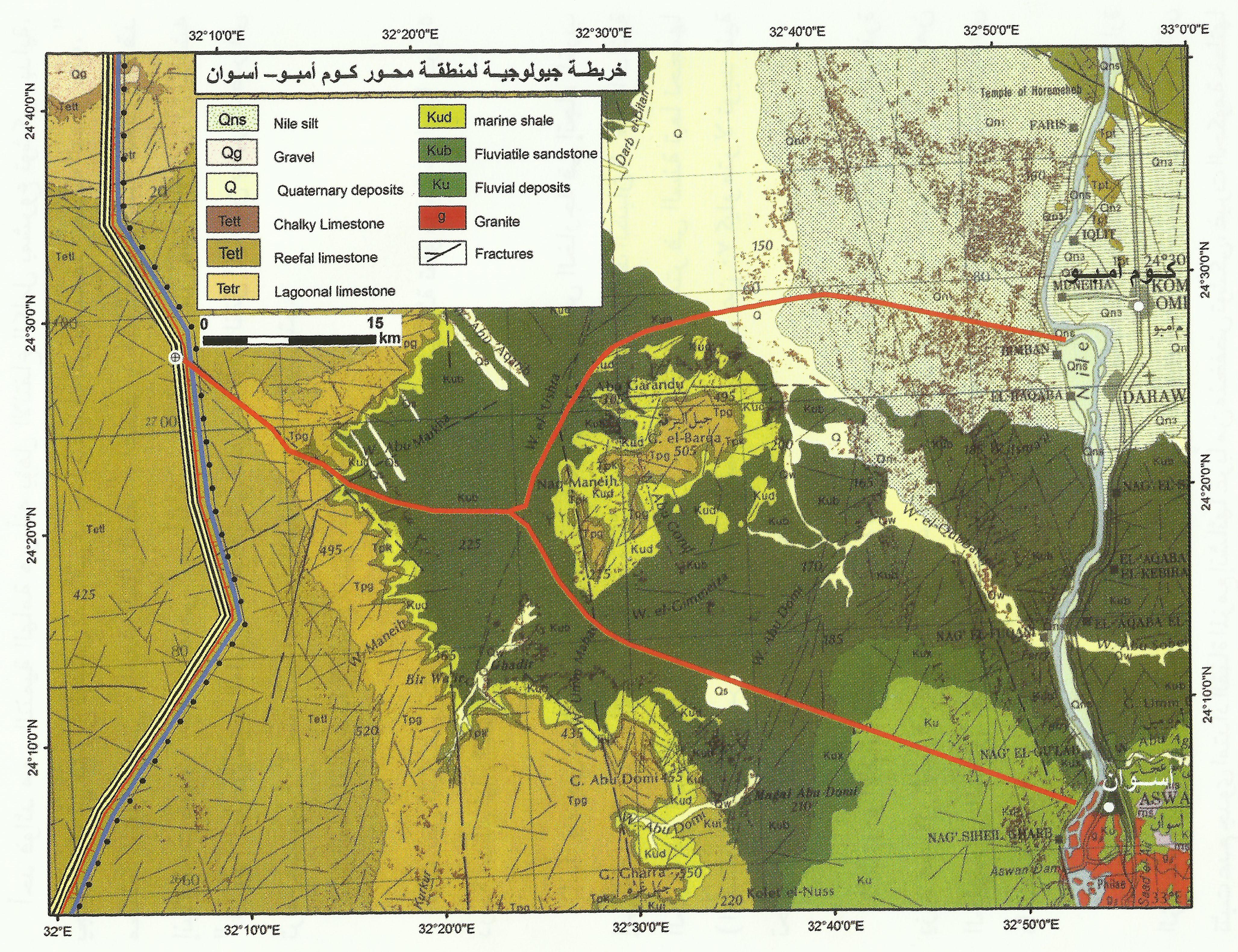 محور تعمير كوم امبو- اسوان